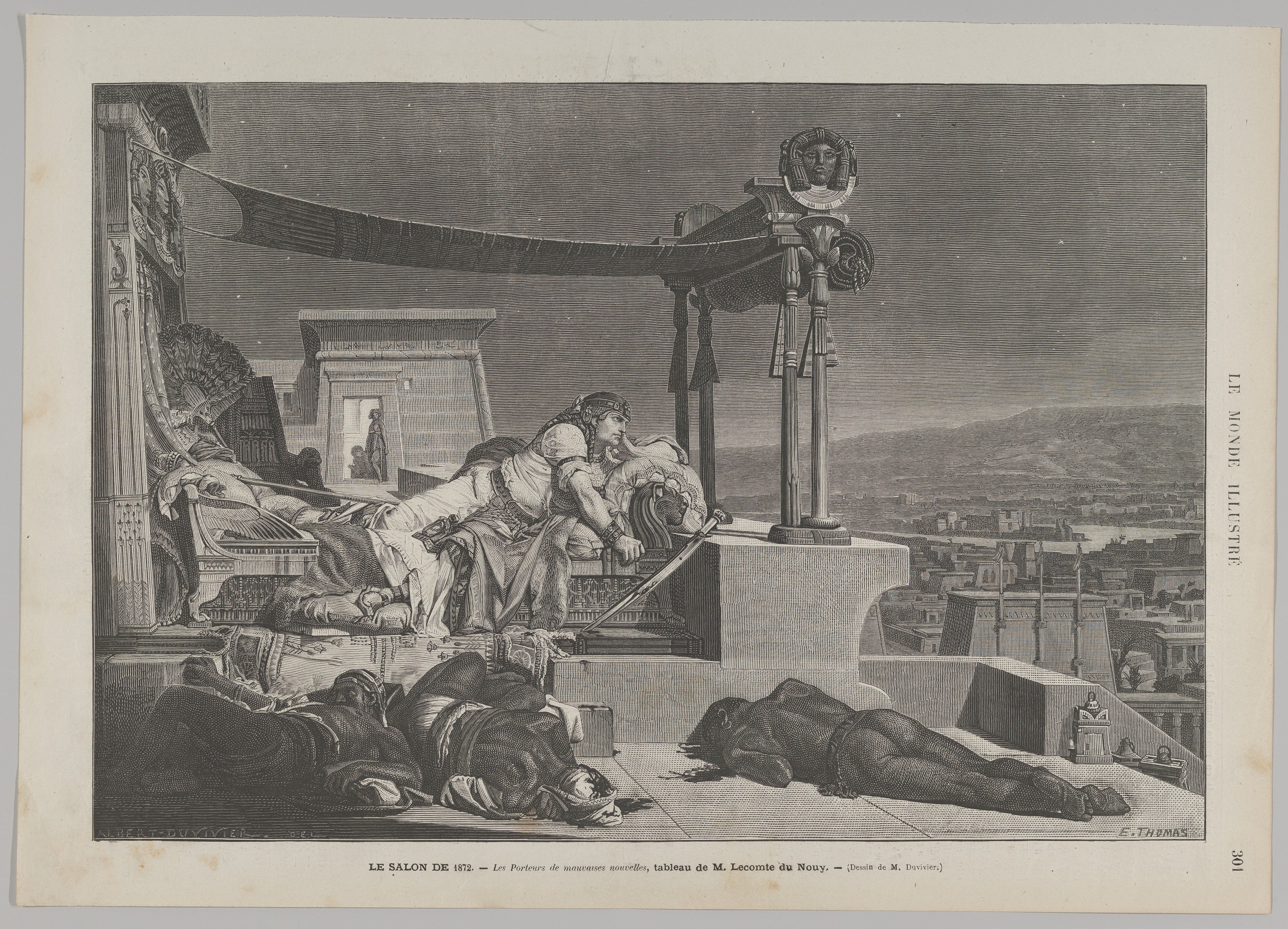 Print, Les porteurs de mauvaises nouvelles (The Bearer of Bad Tidings) from Le Monde Illustré, Artist, Draftsman, Artist, After, Émile Thomas, Albert Duvivier, Jean Lecomte du Nouÿ, French, Vittel, active 1863–1907, French, born Nevers 1842, French, 1842–1923, Thomas, Émile, Duvivier, Albert, Lecomte du Nouÿ, Jean, French, French